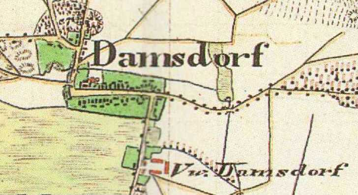 Damsdorf, Ortsteil der Gem. Kloster Lehnin, Lkr. Potsdam-Mittelmark, Brandenburg, Urmesstischblatt 3642 Lehnin, von 1839